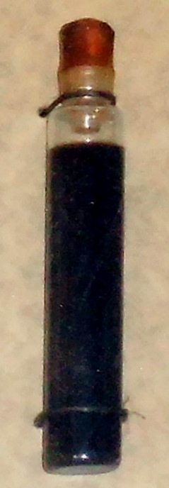 Eine Ampulle mit Carbolineum in einem Schaukasten des Heimat- und Schulmuseums Himmelpforten.